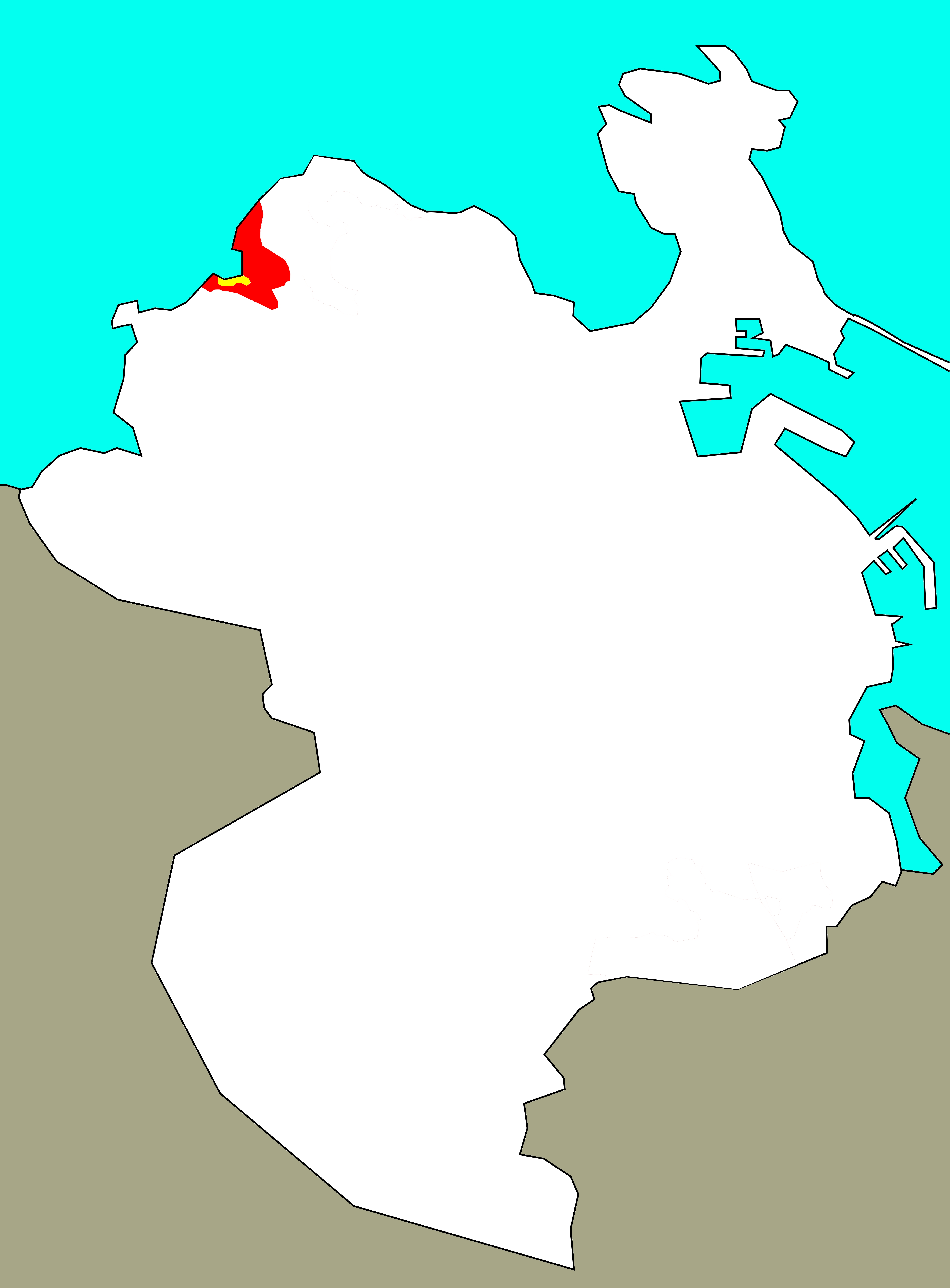 Situación do Portiño no concello da Coruña. En amarelo, o Porto de San Pedro.[1]